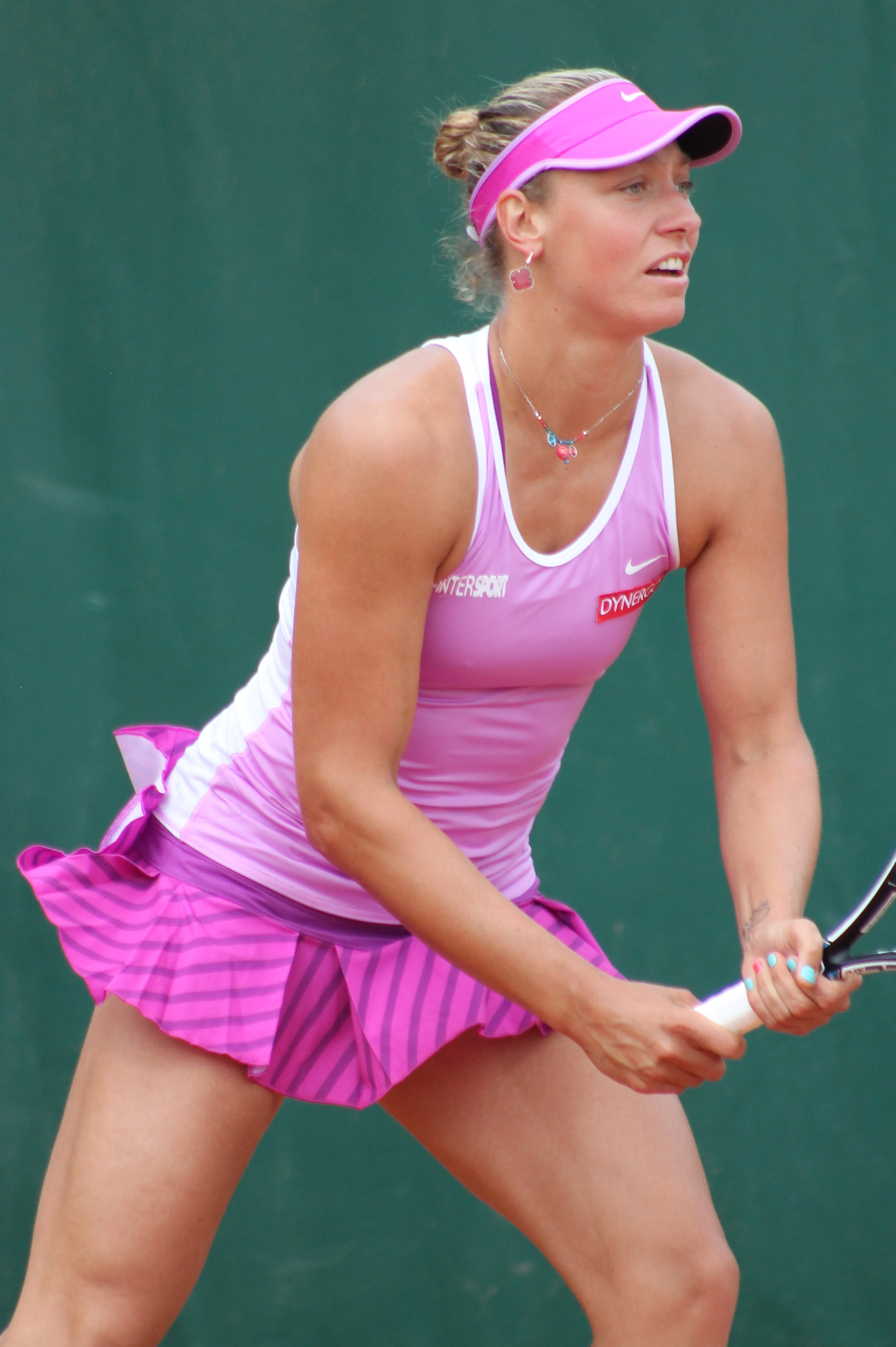 Wickmayer RG15 (11)